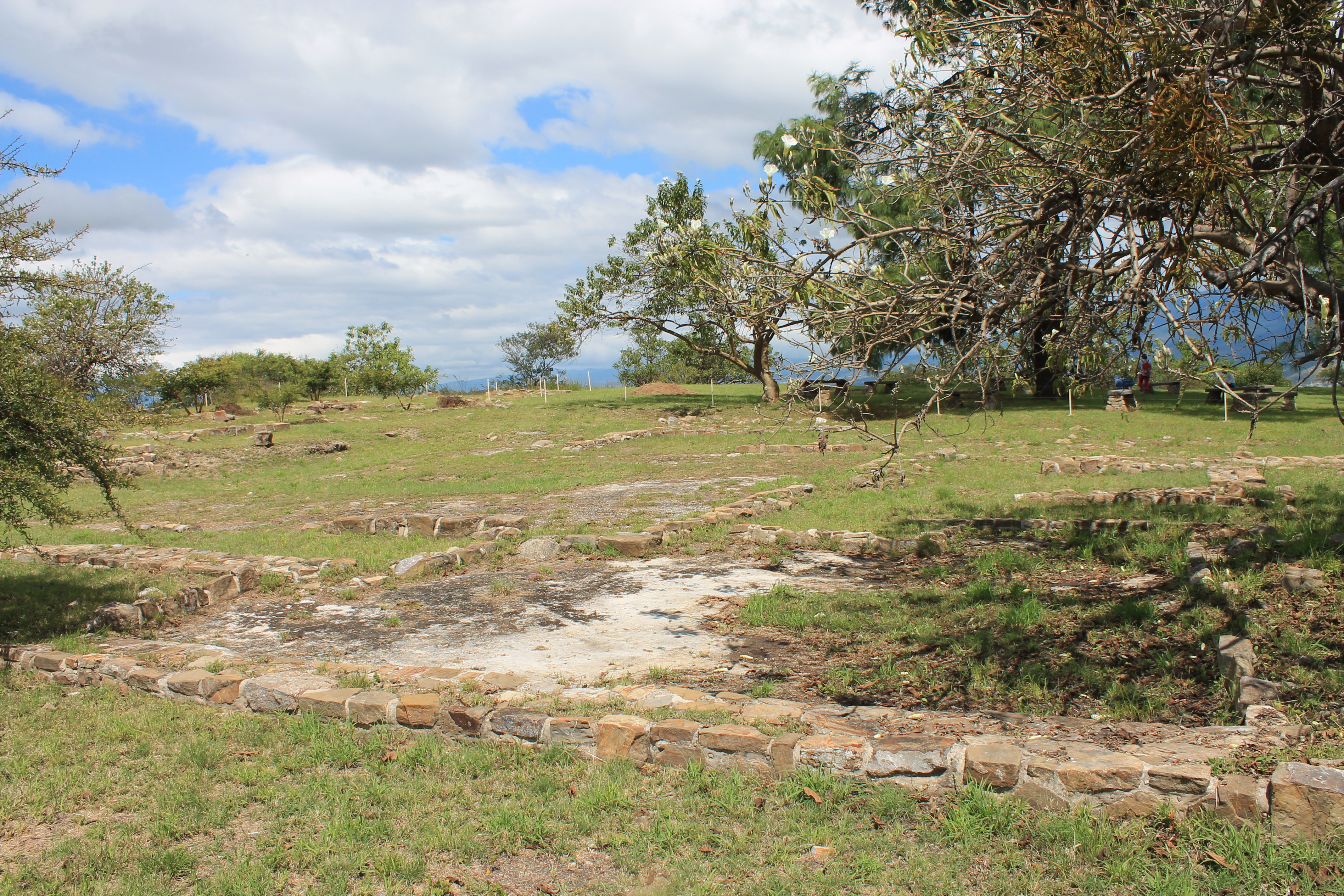 En la imagen se puede divisar los vestigios de lo que fuera el Palacio del Ocote, mismos que son prácticamente la planta de la antigua edificación. El Palacio del Ocote está ubicado en la esquina Noreste de la Plataforma Norte de Monte Albán.